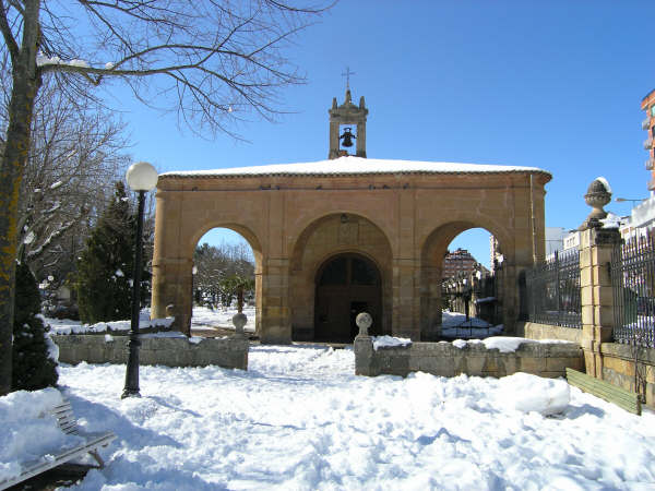 Portada de la Ermita de la Soledad (Soria).